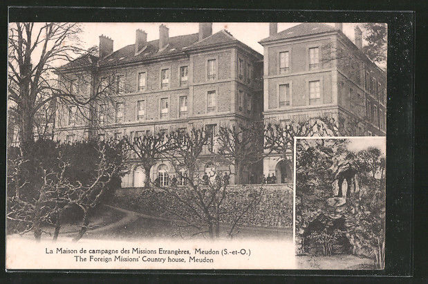 Maison des Missions étrangères de Paris à Meudon.